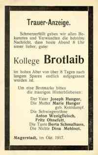 Plakat aus Protest gegen den Hunger im Ersten Weltkrieg